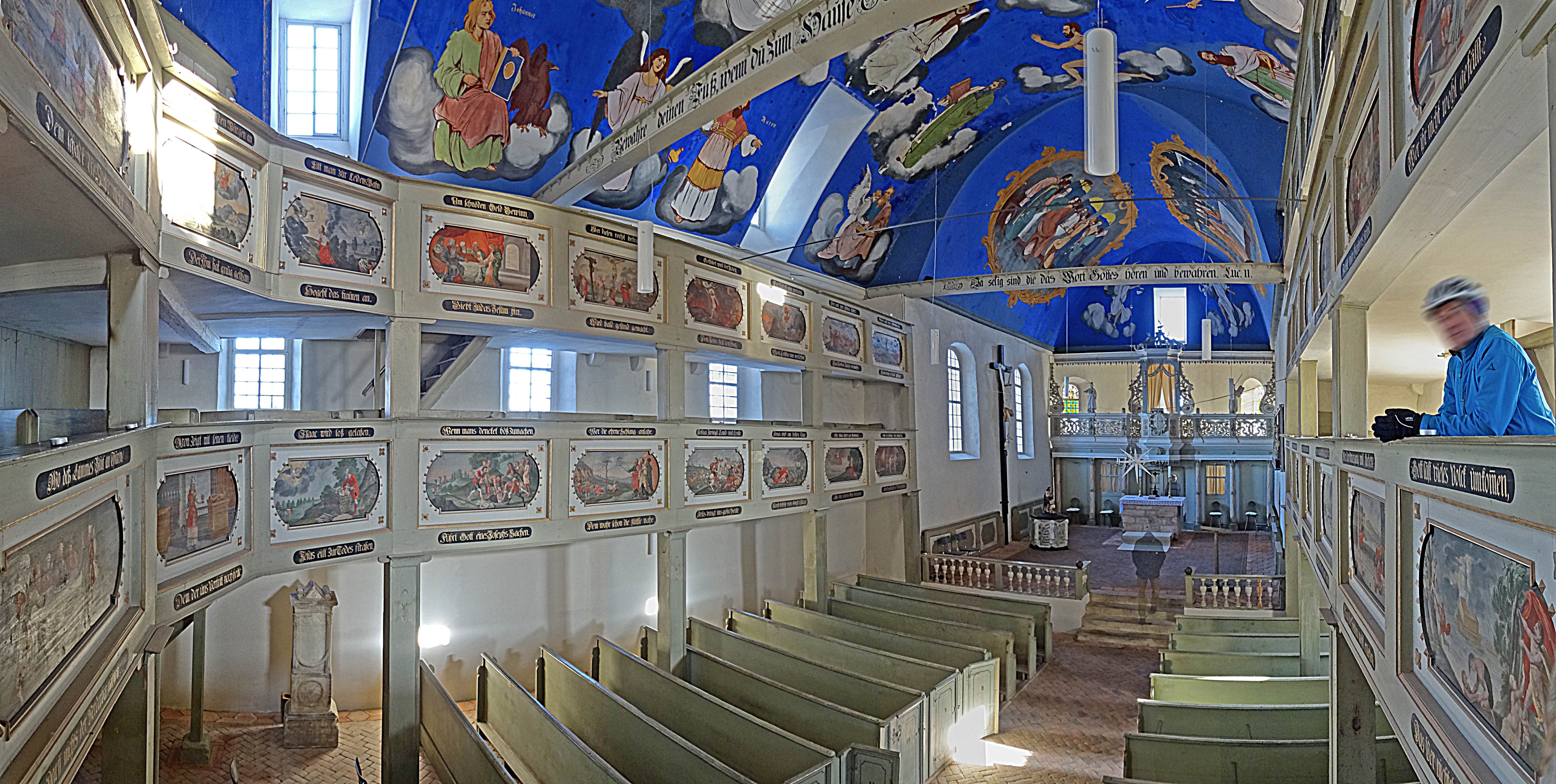 Innenraum Panorama St. Laurentius Kirchheim, Ausmalung mit biblischen Szenen und Figuren von Ernst Liebermann (1898)